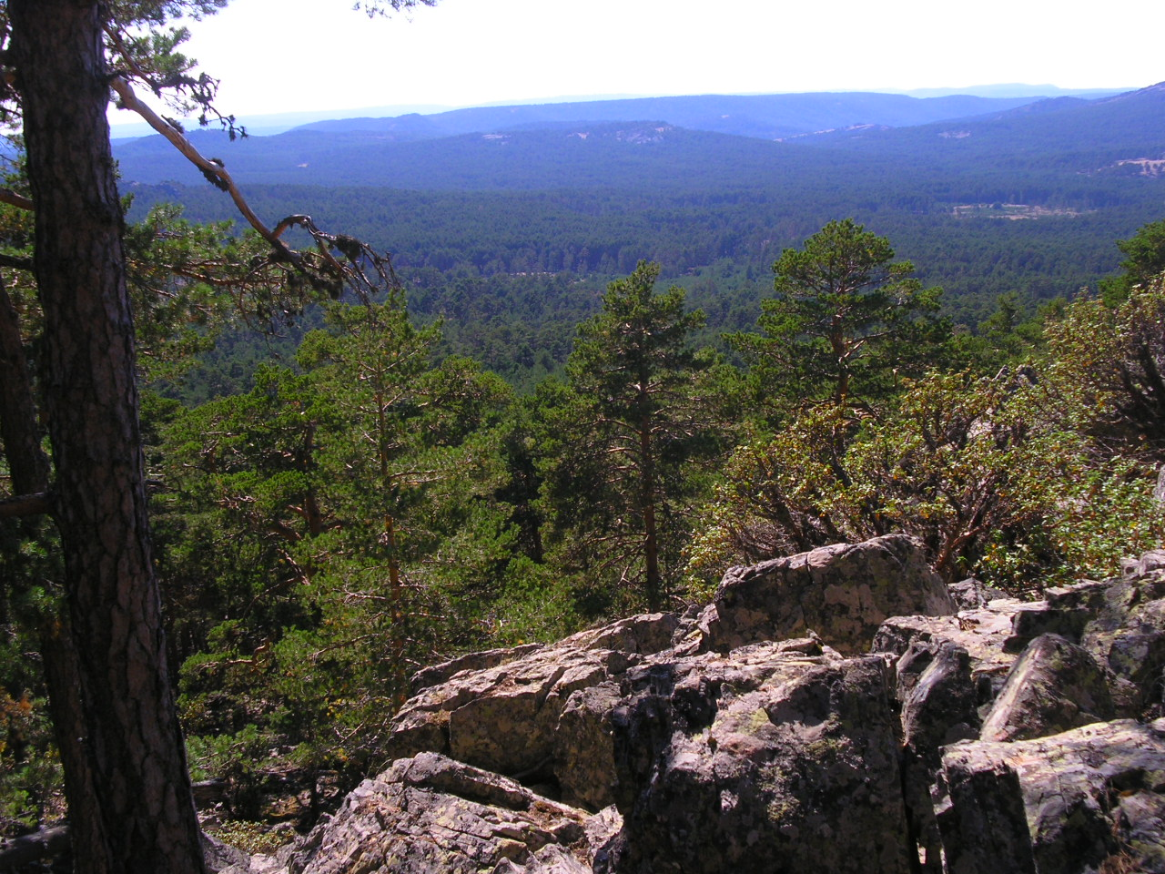 Paisaje en los alrededores de Noguera de Albarracín (Teruel). Imagen de dominio público. Autor: Alberto Ferreras Remesal